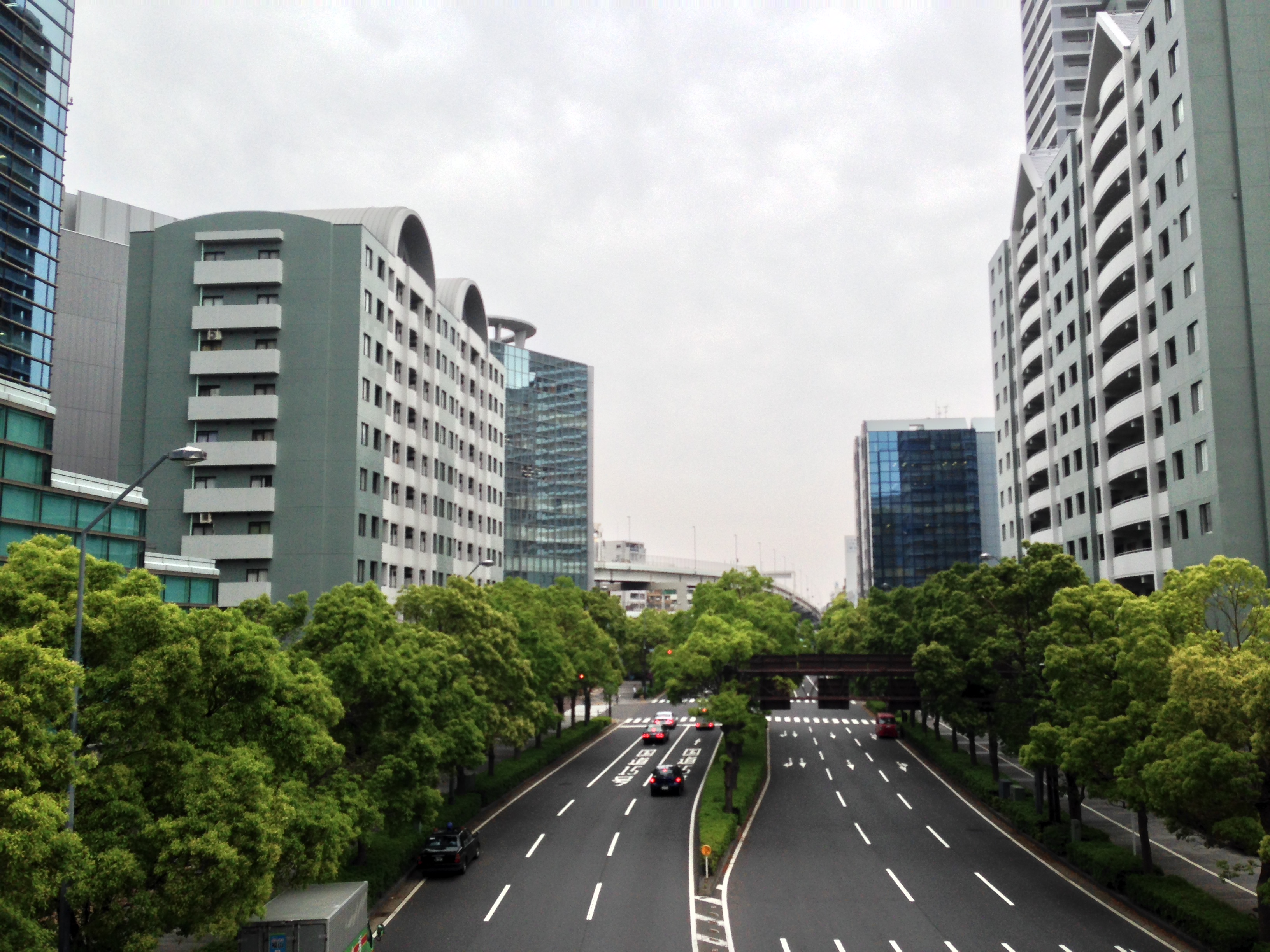 栄本町線（ヨコハマポートサイド地区内）の始点方面。歩行者デッキ「スカイウェイ」より撮影。